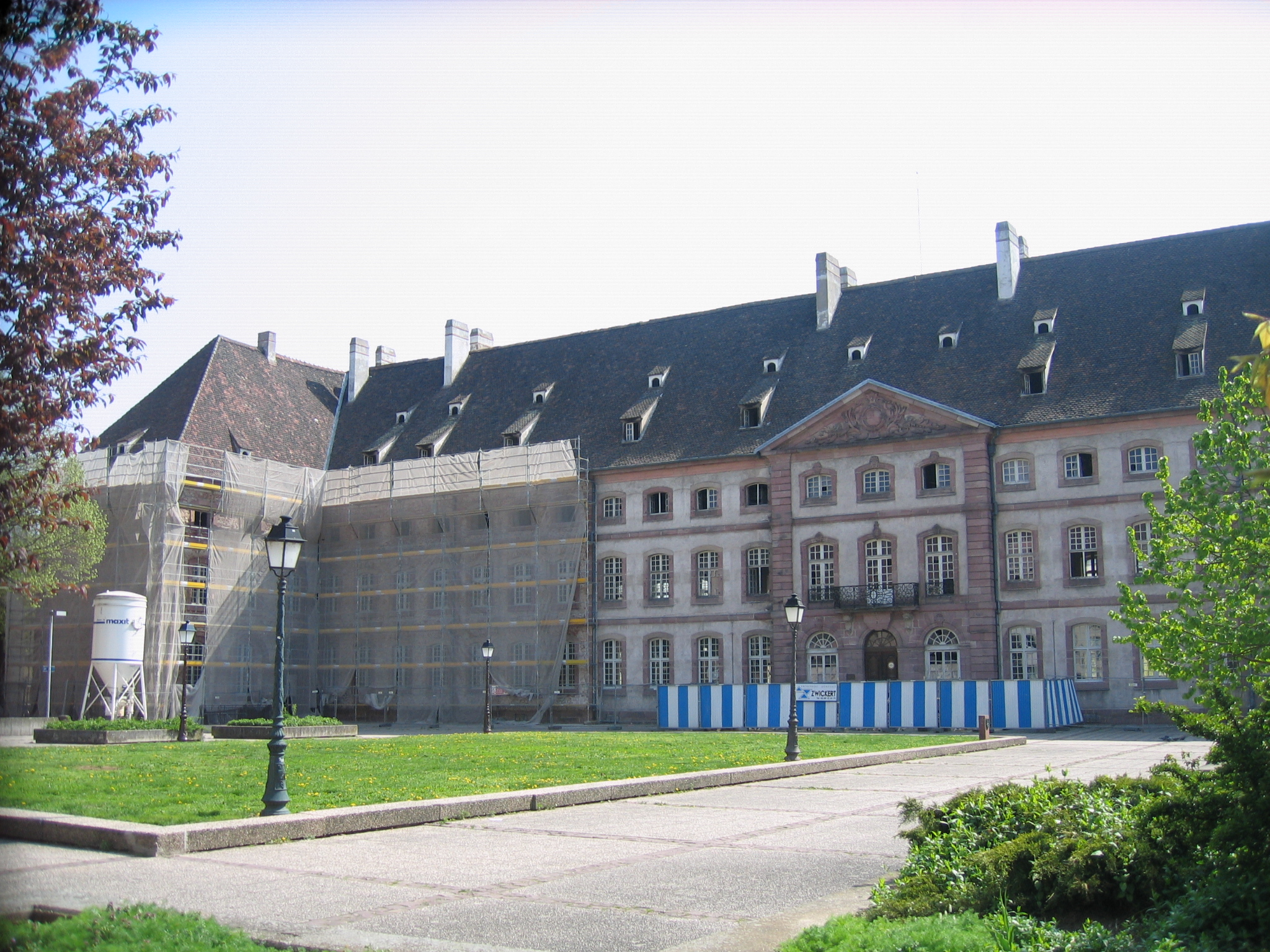 La futur médiathèque en travaux place du 2 Février